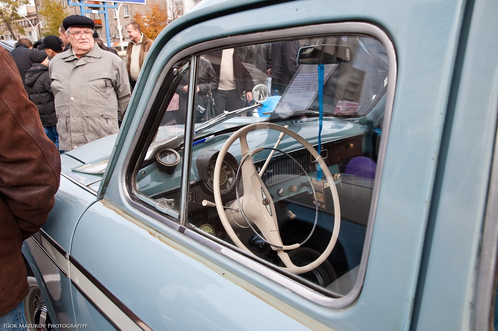 Moskvich 403